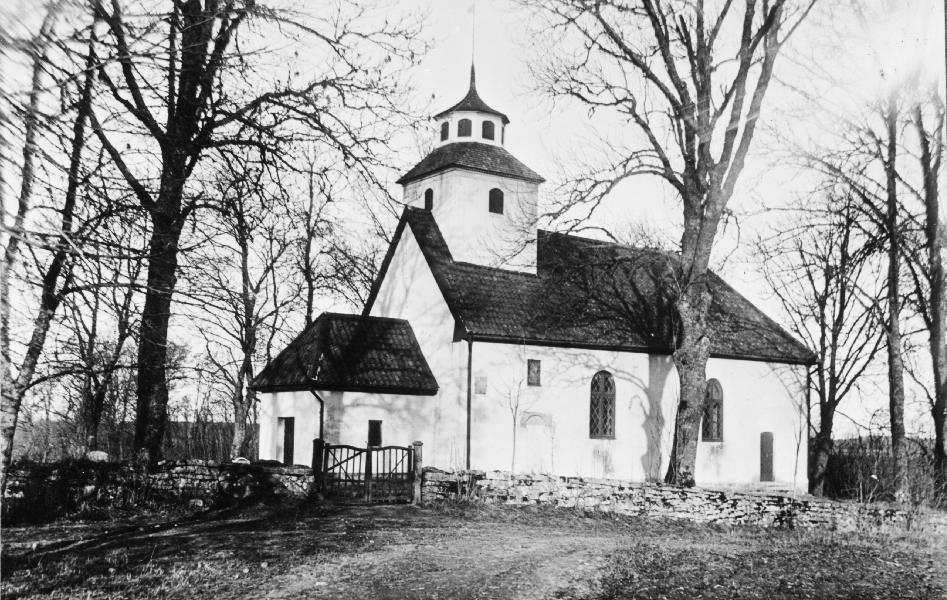 Kyrkan från sydväst. Kategori: (01) ExteriörerKyrkan från sydväst.